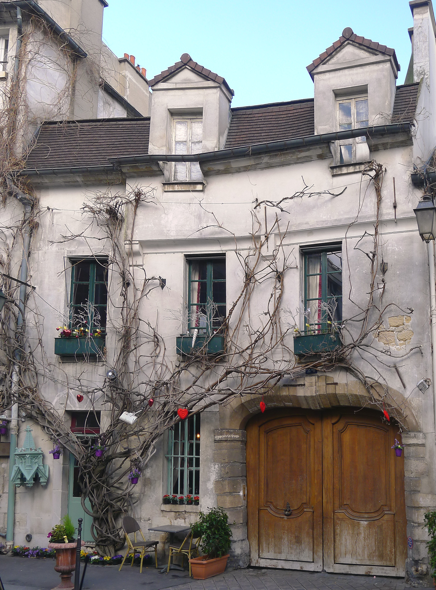 Rue Chanoinesse (n°24) - Paris IV Les vestiges de l'ancienne chapelle Saint-Aignan situés au fond de la cour du 24 rue Chanoinesse sont inscrits aux M.H.. .